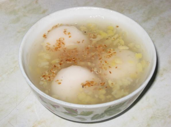 Hình thu nhỏ của một bát bánh chay, làm minh hoạ cho bài viết về đối tượng